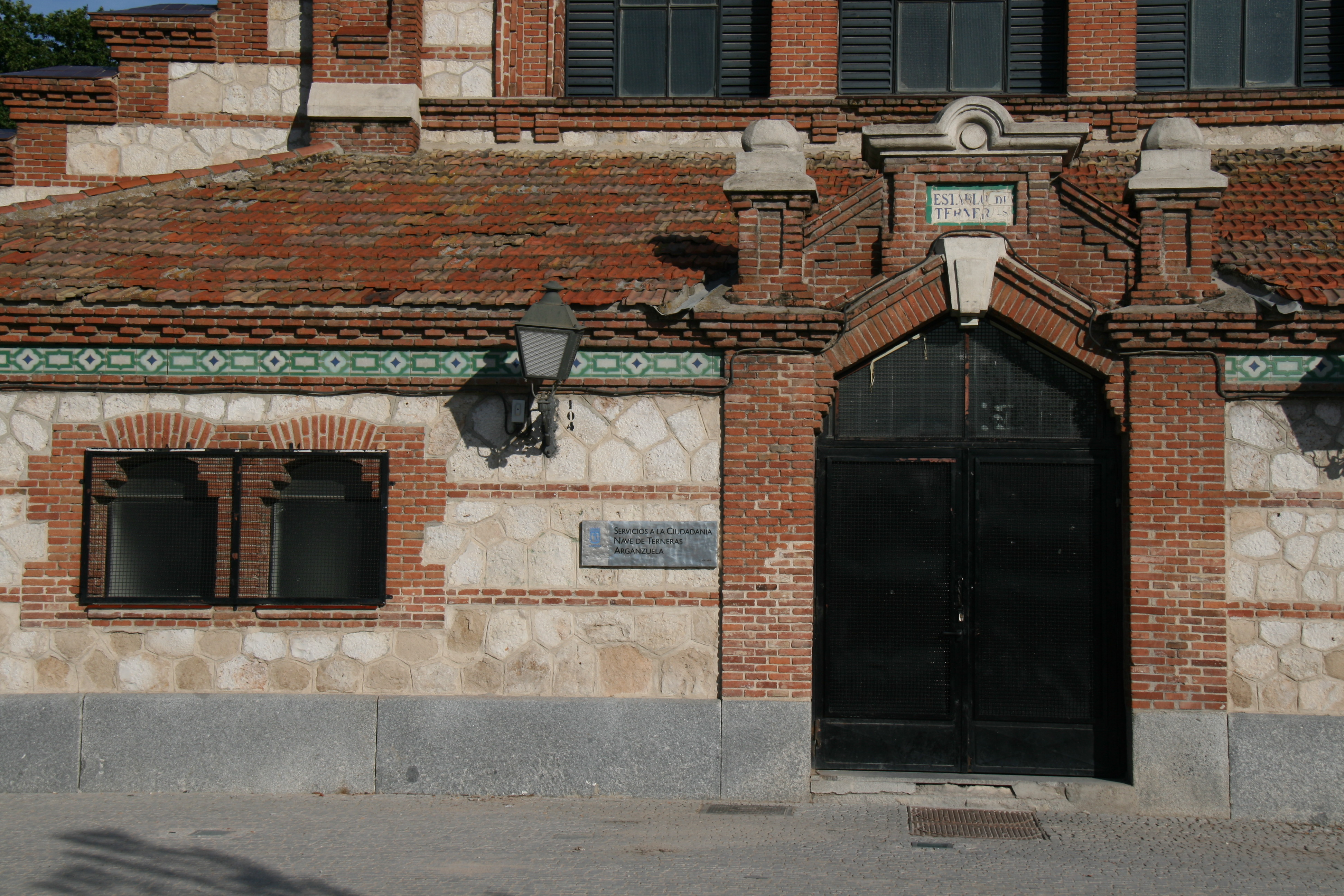 Casa de Terneras - Matadero de Legazpi